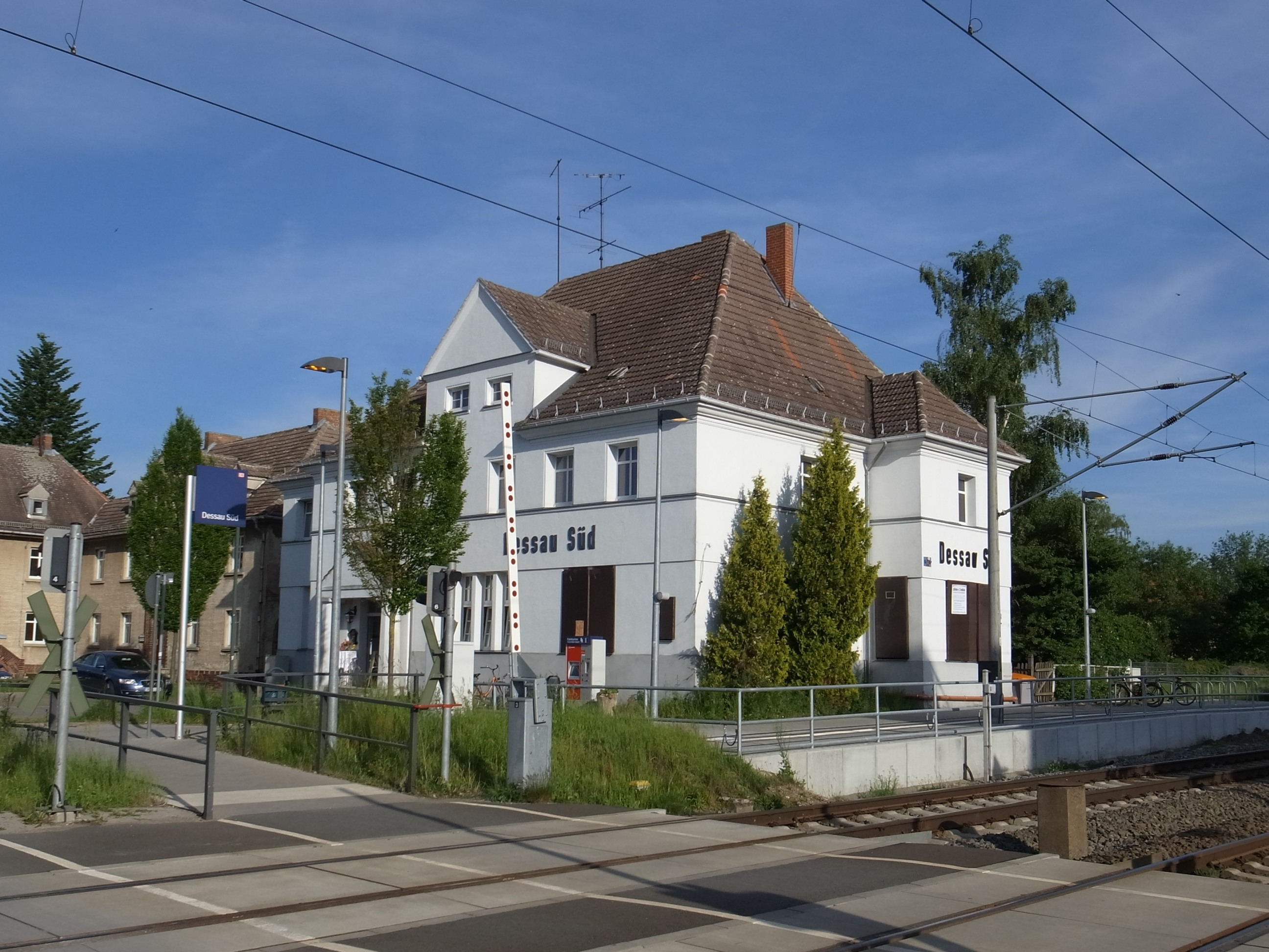 Dessau-Roßlau, Peterholzstraße, Bahnhof Dessau-Süd (Baudenkmal im Denkmalverzeichniss Sachsen-Anhalt, Erfassungsnummer: 094 40146 000 000 000 000 [1])